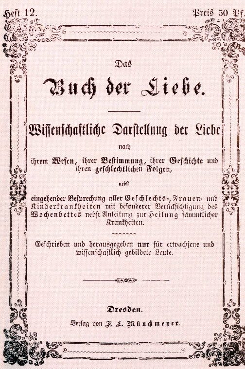 Das Buch der Liebe